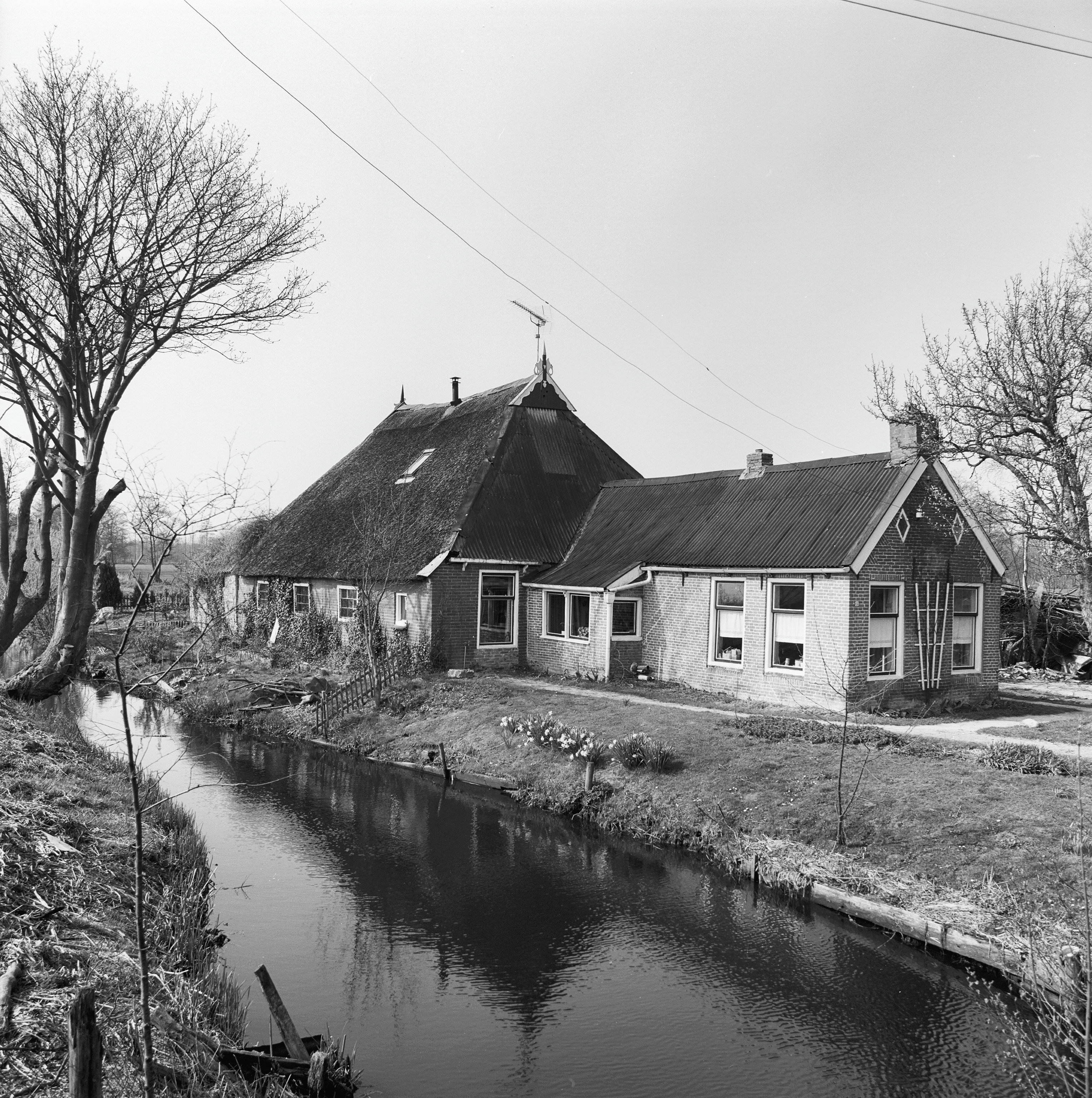 HUSTERNOARD: Exterieur OVERZICHT